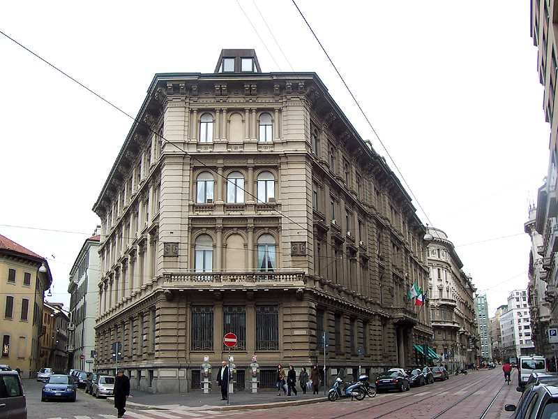 Milano - Palazzo Bertarelli (Sede Touring Club Italiano)